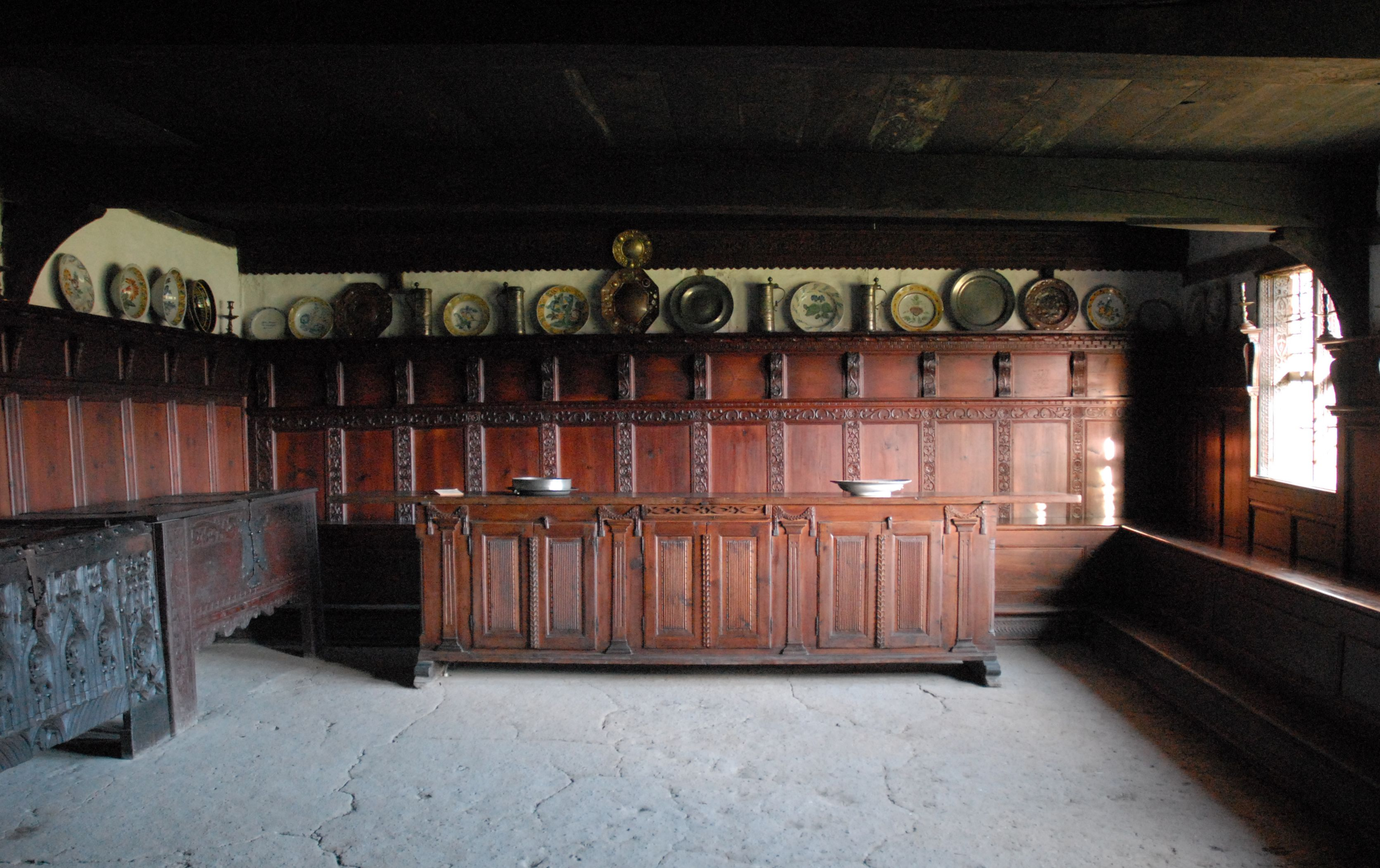 Pisel, Ostenfeld. På panelhylderne tin og fajancefade, bl.a. fra Kelllinghusen